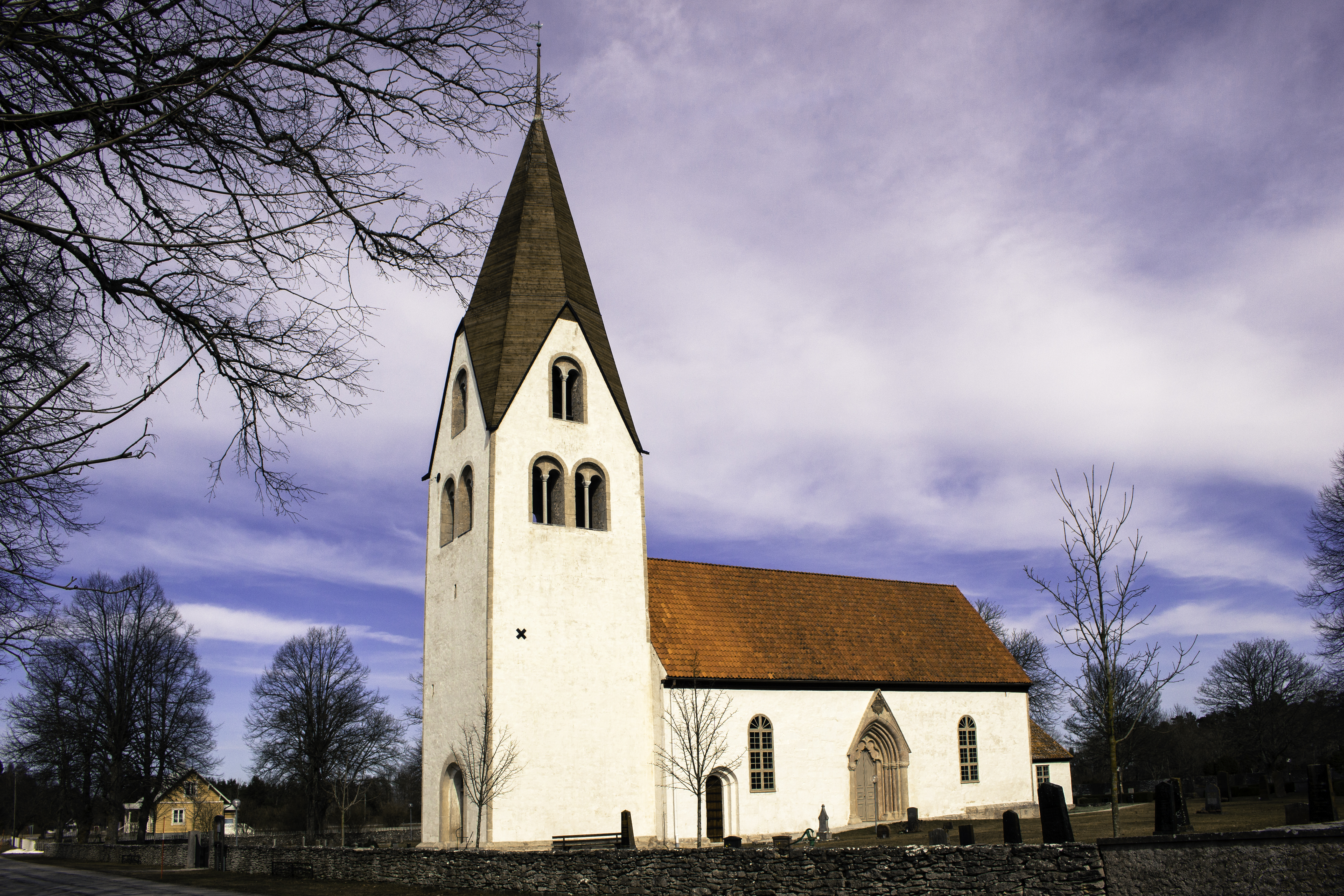 Igrexa de Eksta, na illa sueca de Gotland.